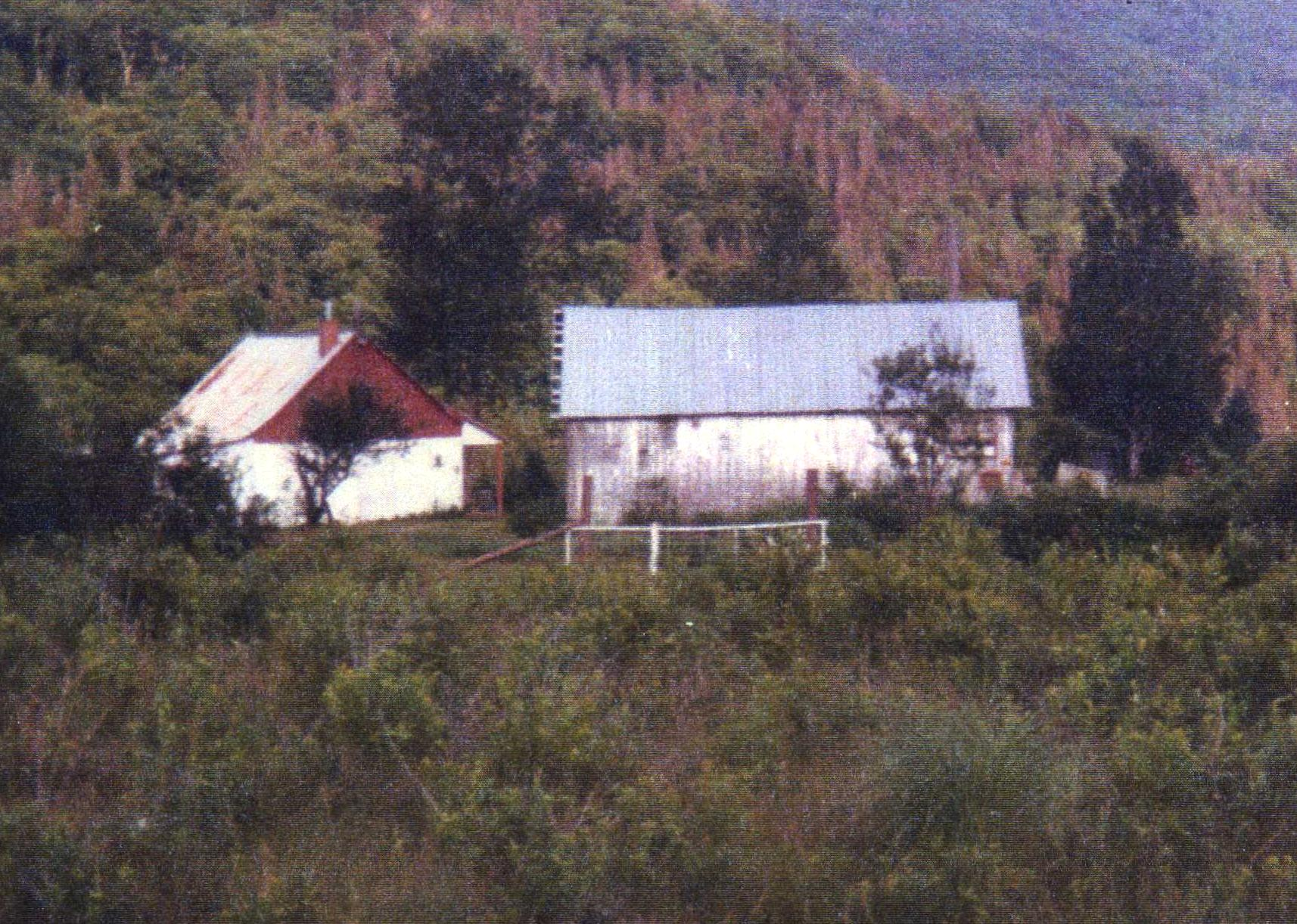 Maison ancestrale des Falardeau à Tewkesbury Qc Canada